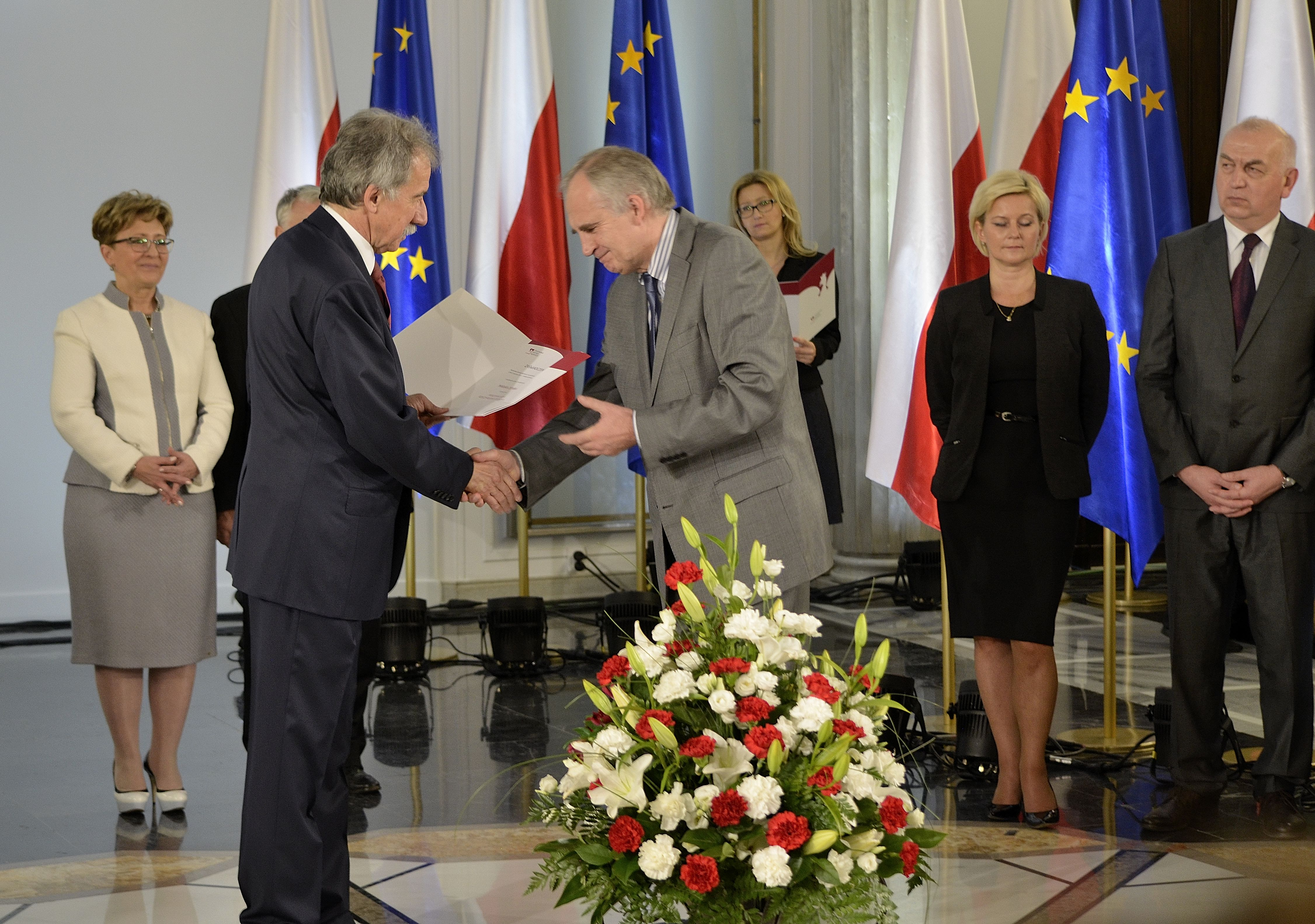 Poseł Marian Zembala podczas uroczystości wręczenia zaświadczeń o wyborze nowo wybranym posłom w Sali Kolumnowej Sejmu